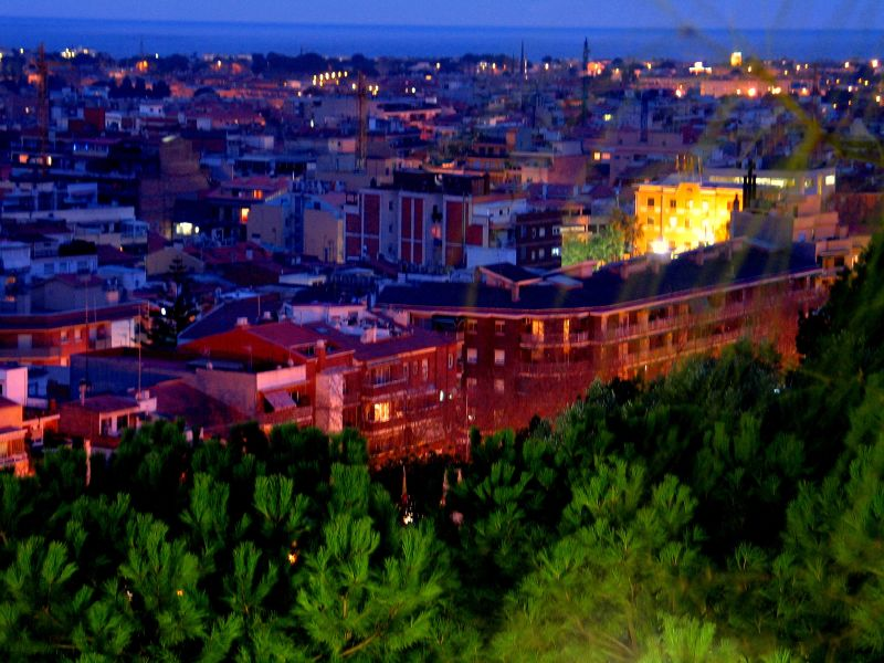 Nattlig utsikt over Castelldefels.